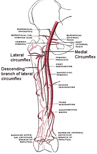 Schema der Oberschenkelarterien des Menschen.